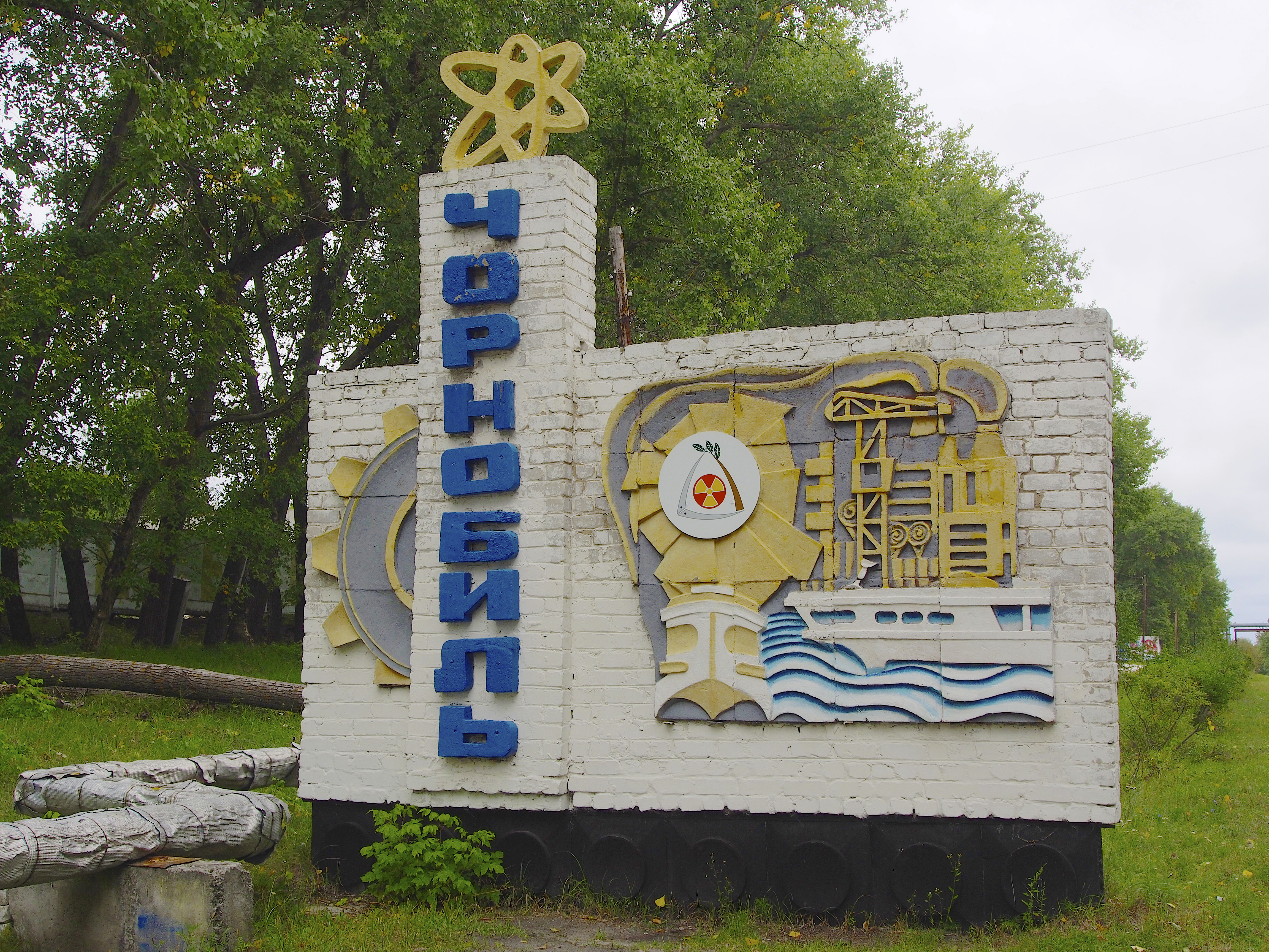 Chernobyl